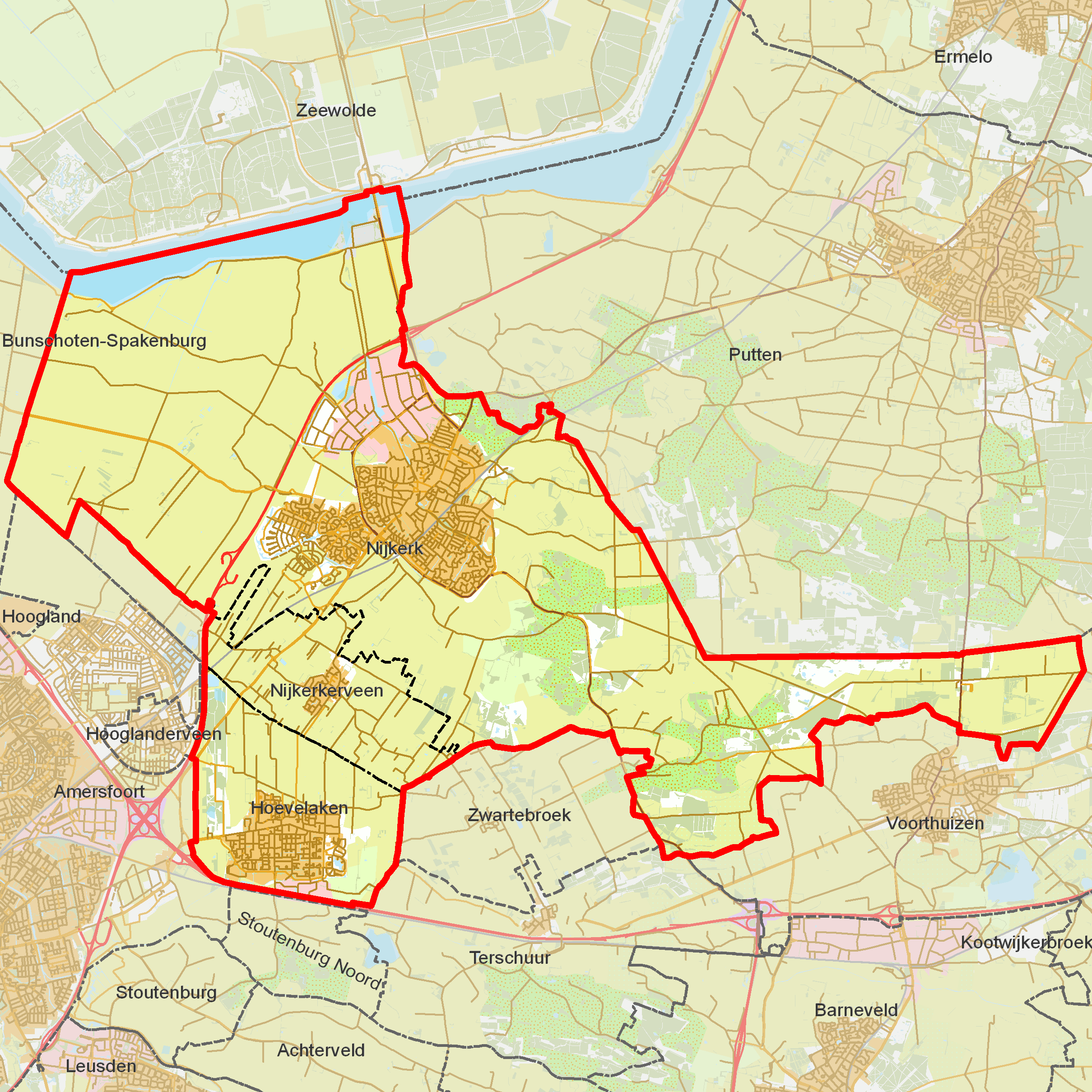 BAG woonplaatsen - Gemeente Nijkerk.png